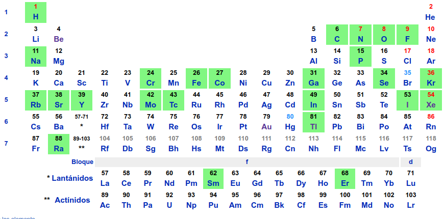 Tabla periódica con radionúclidos resaltados